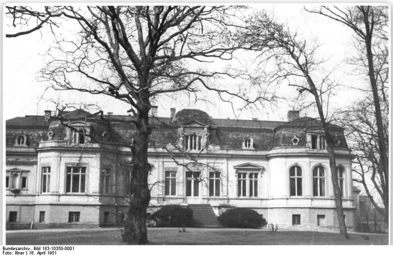 Breitenfeld, Blick auf das Kulturhaus Illus Illner 16.4.1951 Der Mittelpunkt des kulturellen Lebens ihrer Umgebung ist die " MAS der Deutsch-Sowjwtischen Freundschaft ", Breitenfeld (Sachsen) mit ihrem Kulturhaus. UBz: Das Kulturhaus, ehemaliger Herrensitz, dient jetzt den werktätigen Menschen.